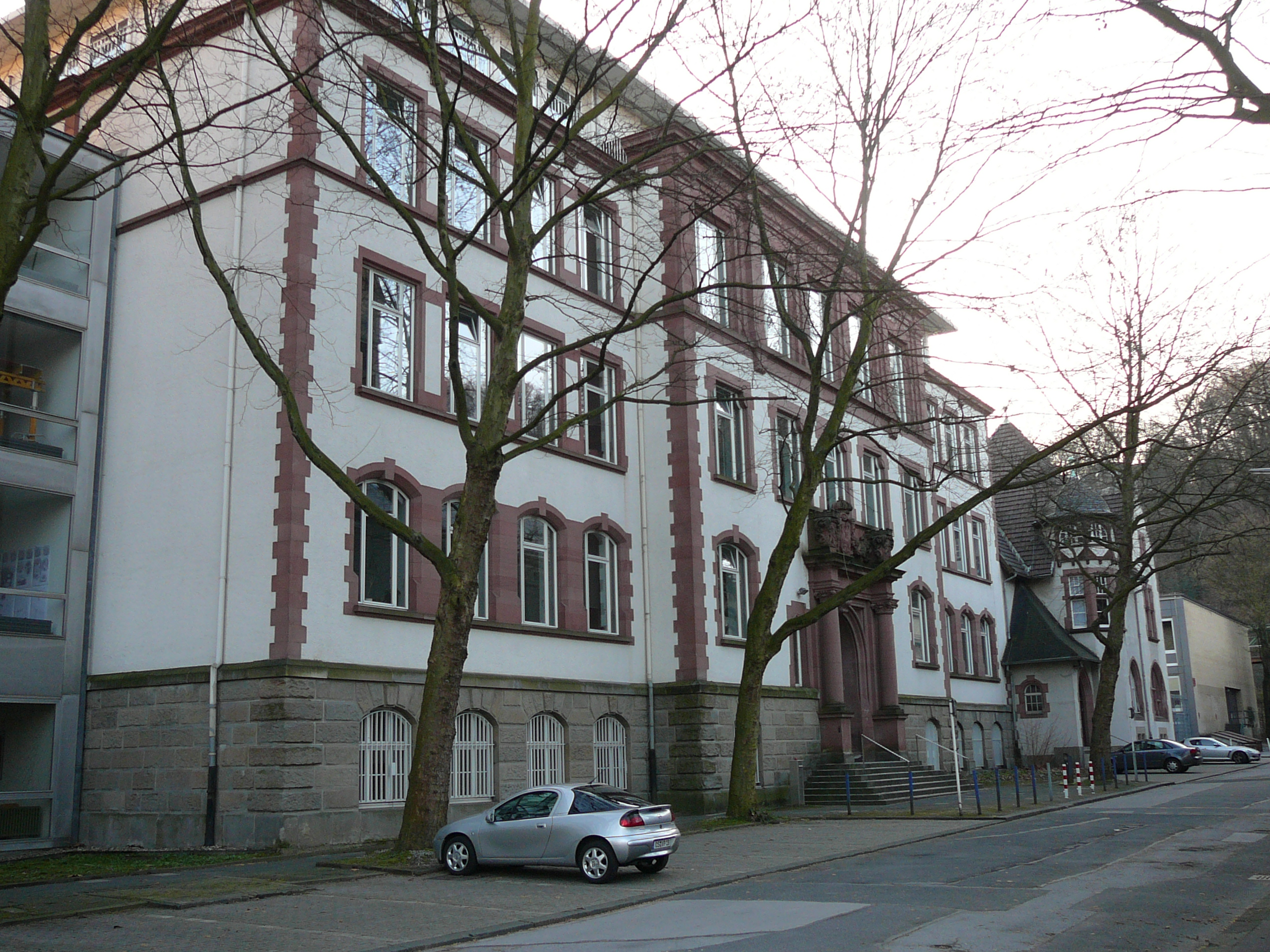 Pauluskirchstraße, Wuppertal